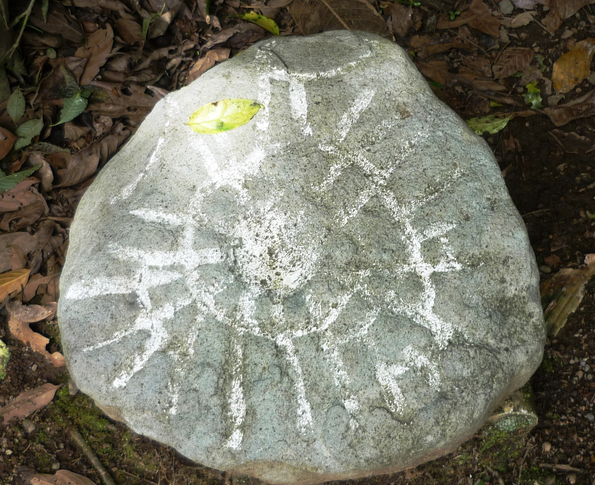 Uno de los petroglifos existentes en el Monumento Nacional Guayabo, Costa Rica